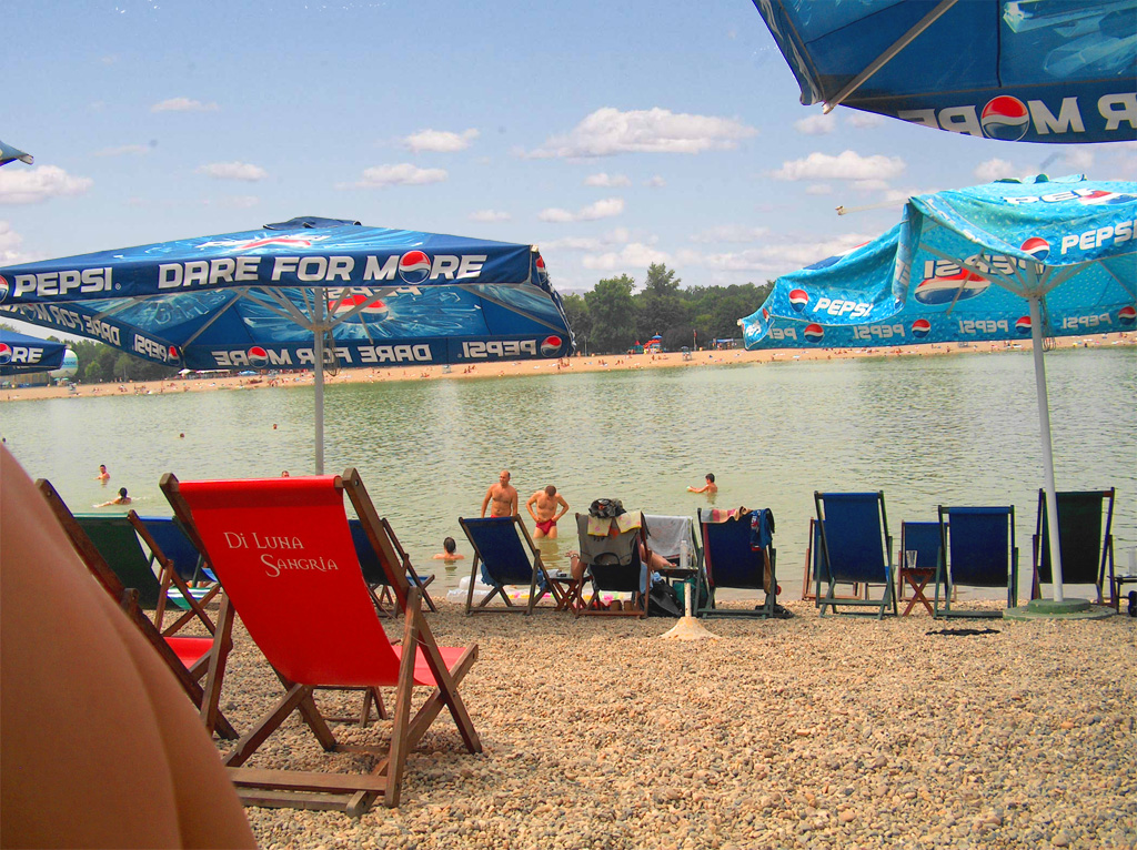 Ада Циганлија.